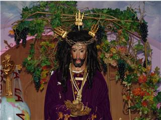 Jesus Nazareno